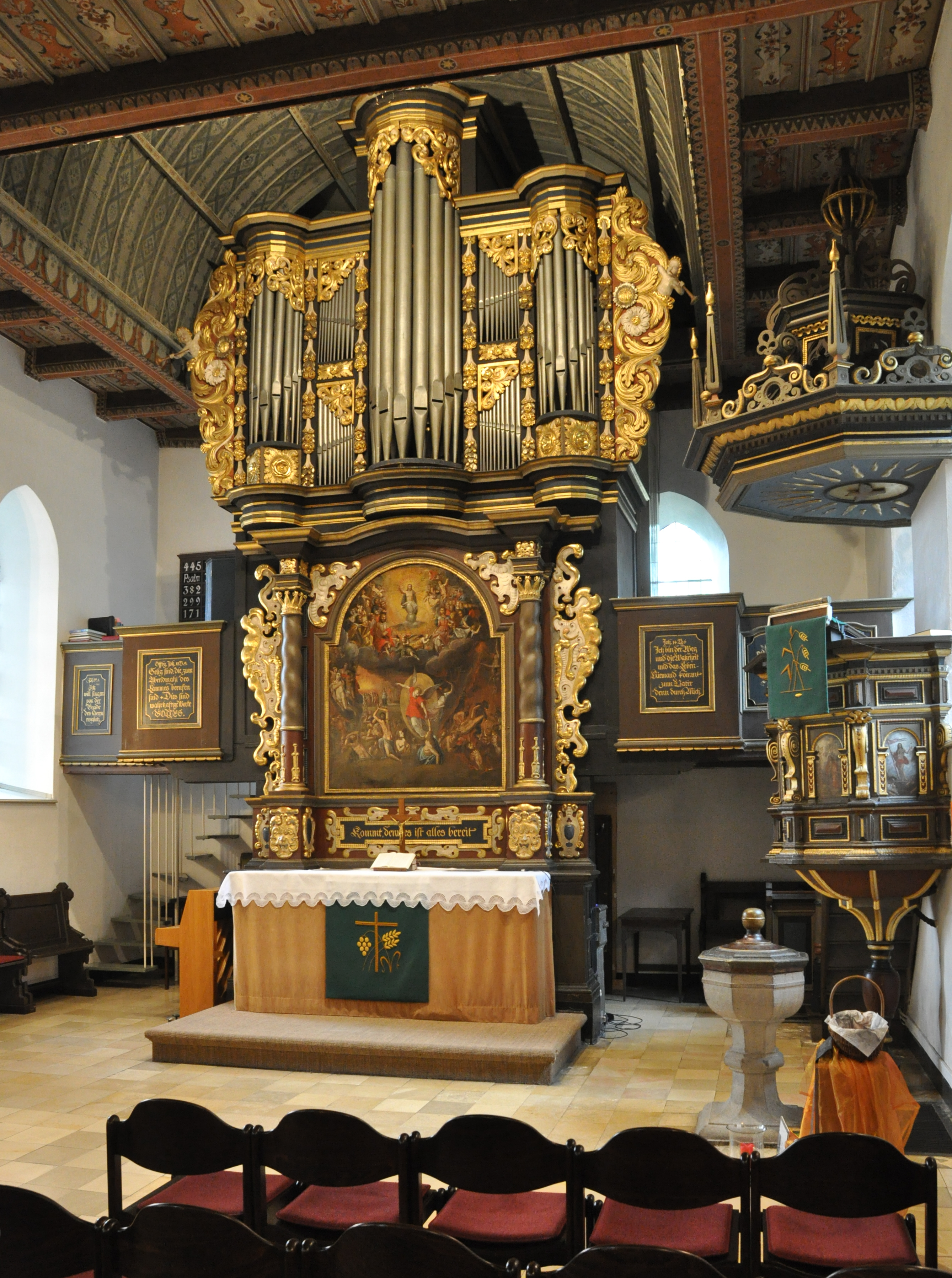 Dorfkirche Volmarstein in Wetter (Ruhr), Nordrhein-Westfalen – Innenraum nach Osten mit Altar, Orgel, Taufstein und Kanzel This is a photograph of an architectural monument.